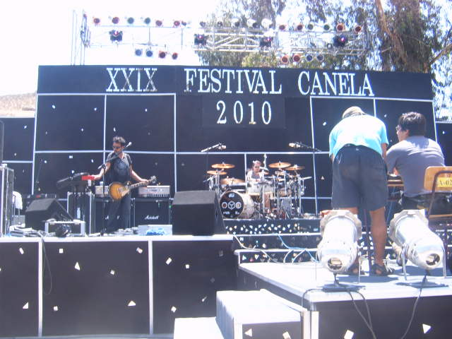 FESTIVAL CANELA CANTA EN VERANO "ENSAYO LUCYBELL"